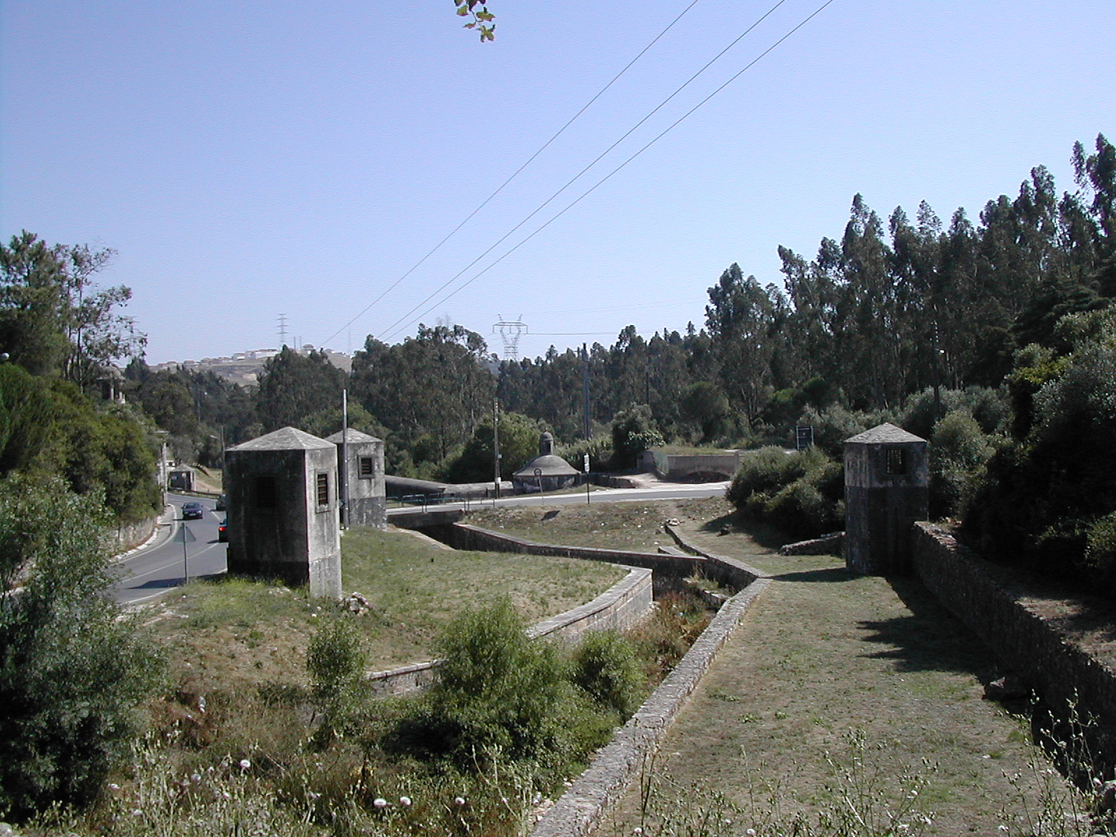 Aqueduto das Águas Livres, Mãe de Água, Belas, Portugal